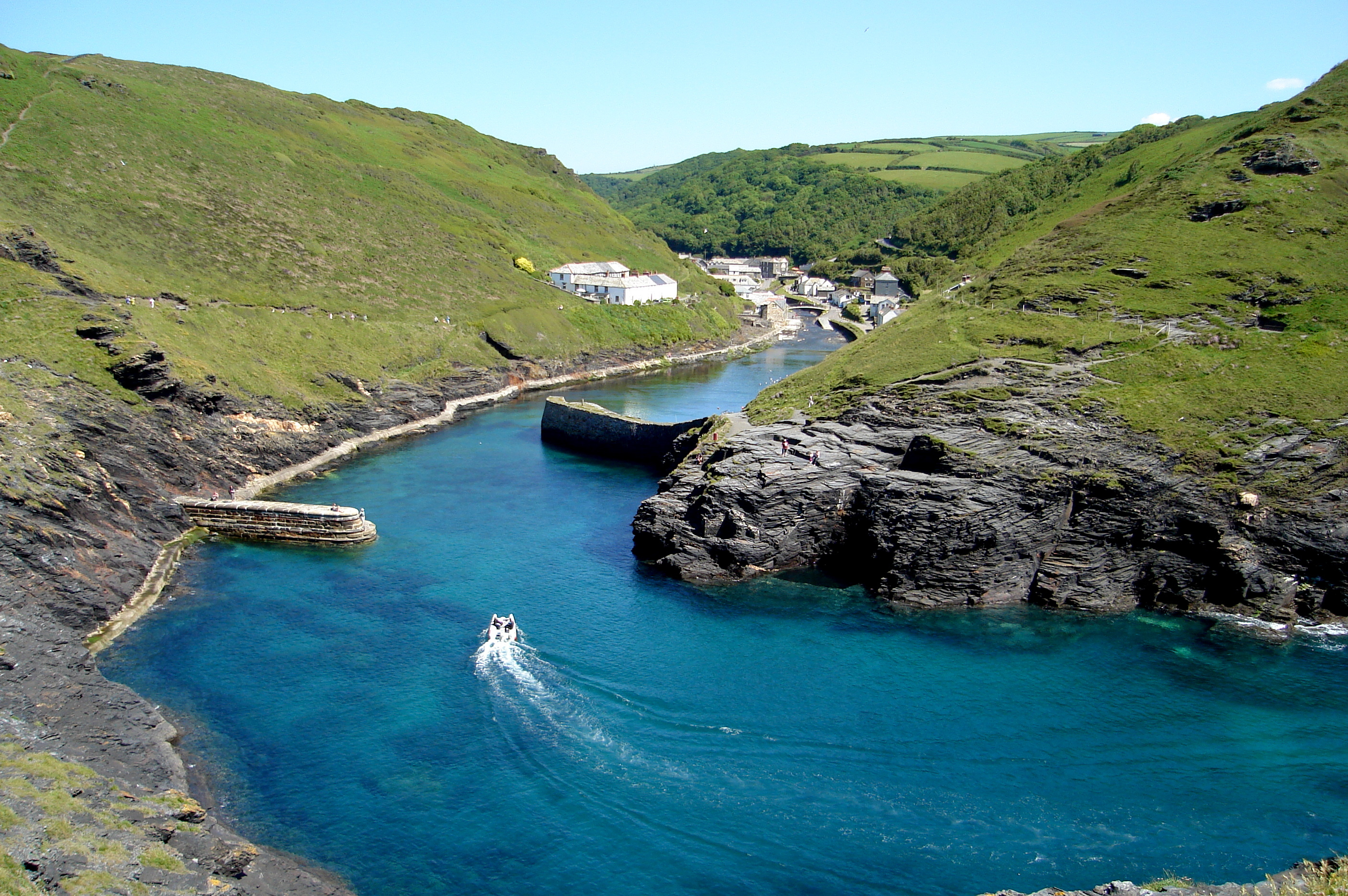 BOSCASTLE